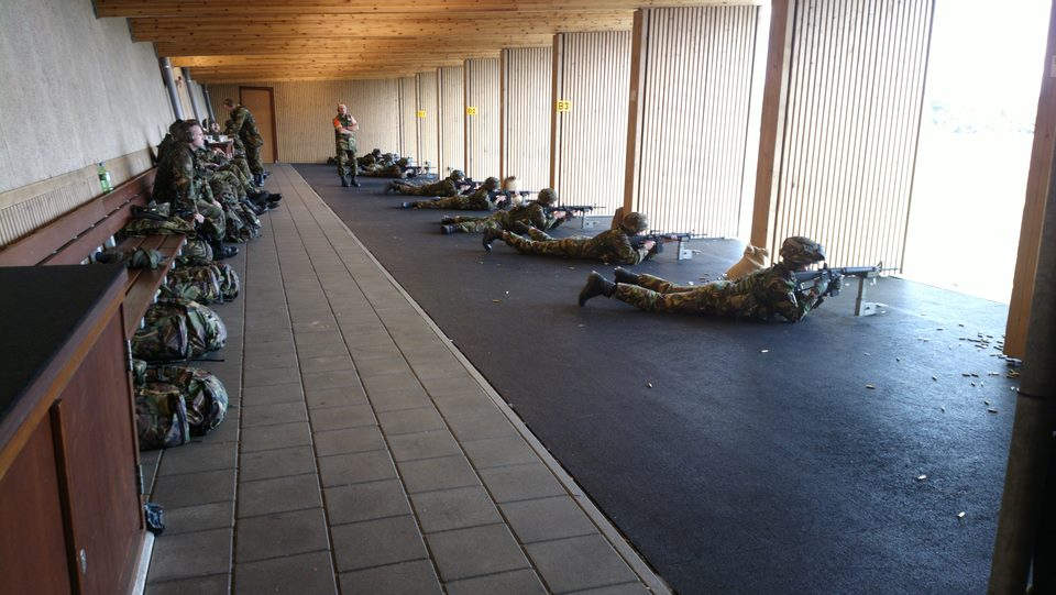 Dcie opleidings- en trainingsprogramma